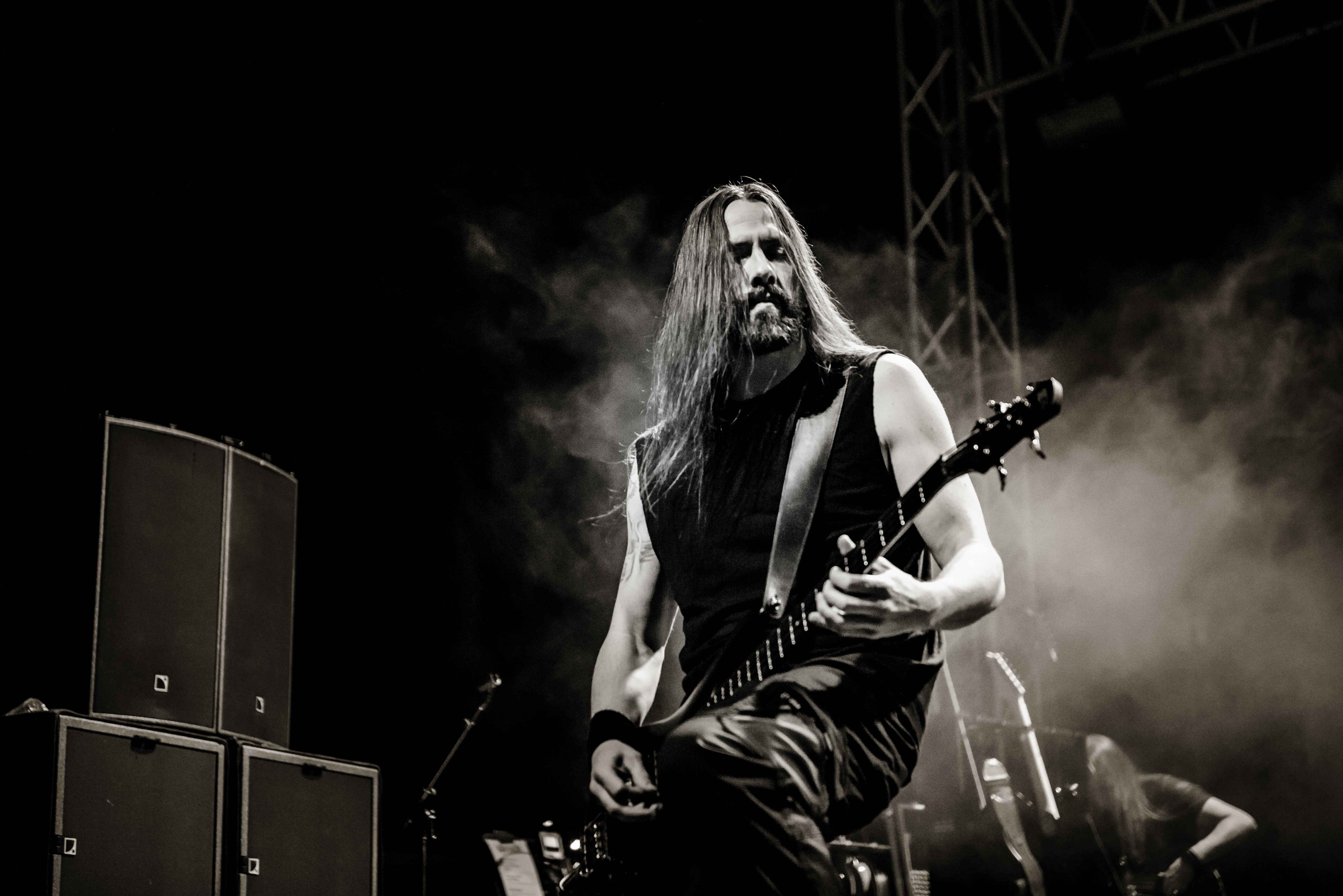 'Ruhrpott Metal Meeting 2016; Oberhausen Turbinenhalle': 'Kataklysm'